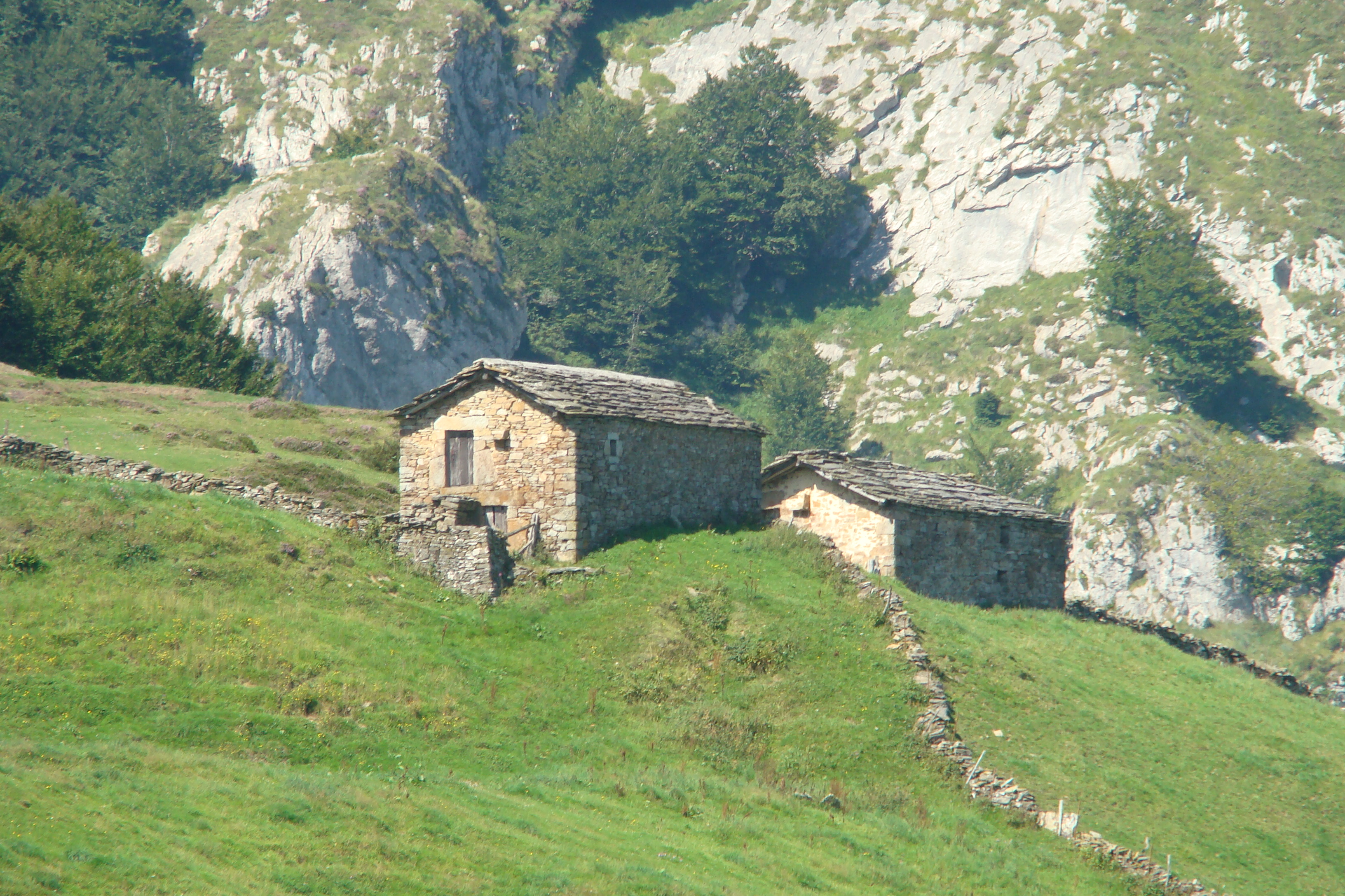 ejemplo de cabaña pasiega Los Yagos (La Sia)